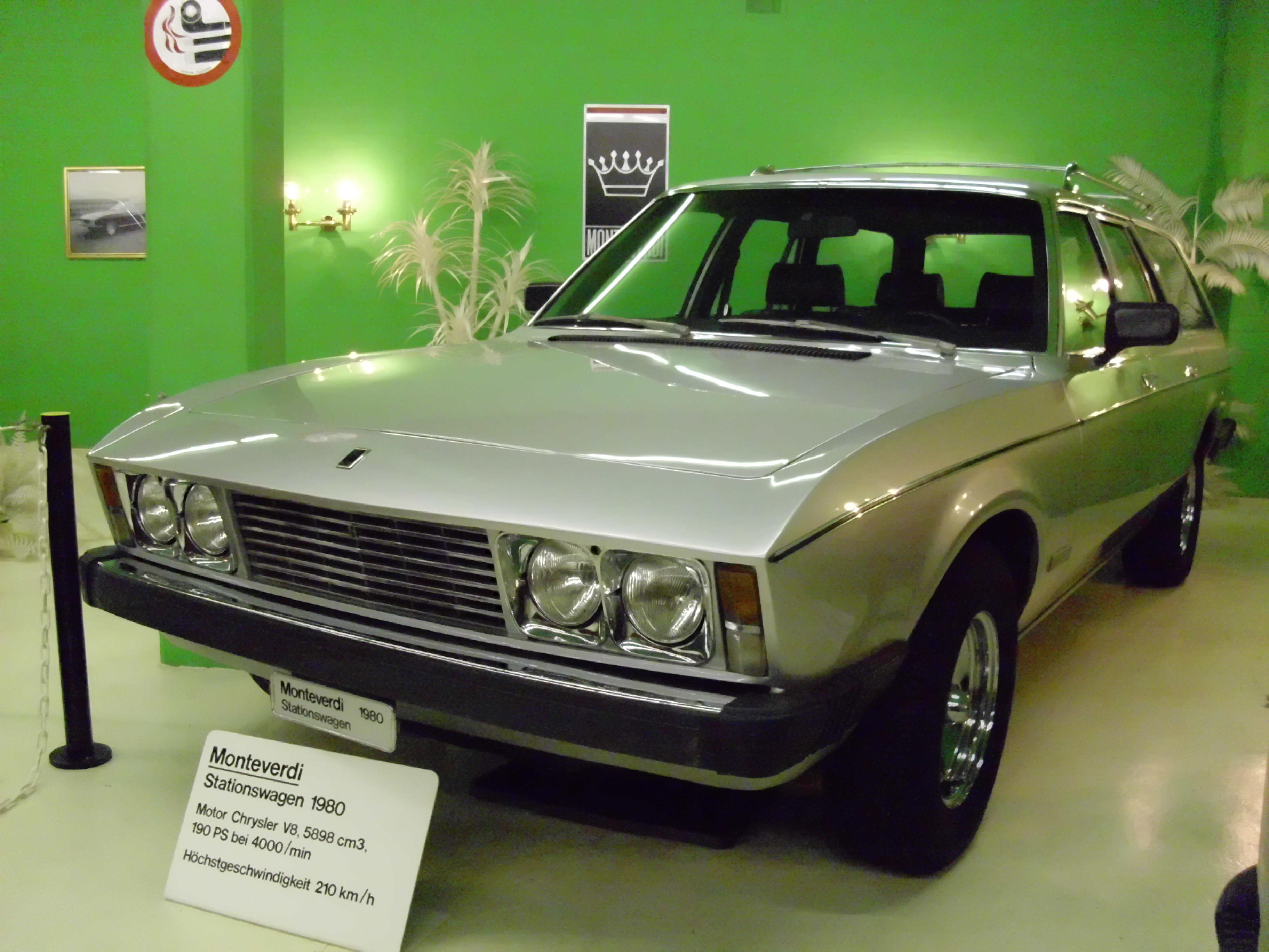 Monteverdi Sierra Kombi von 1980